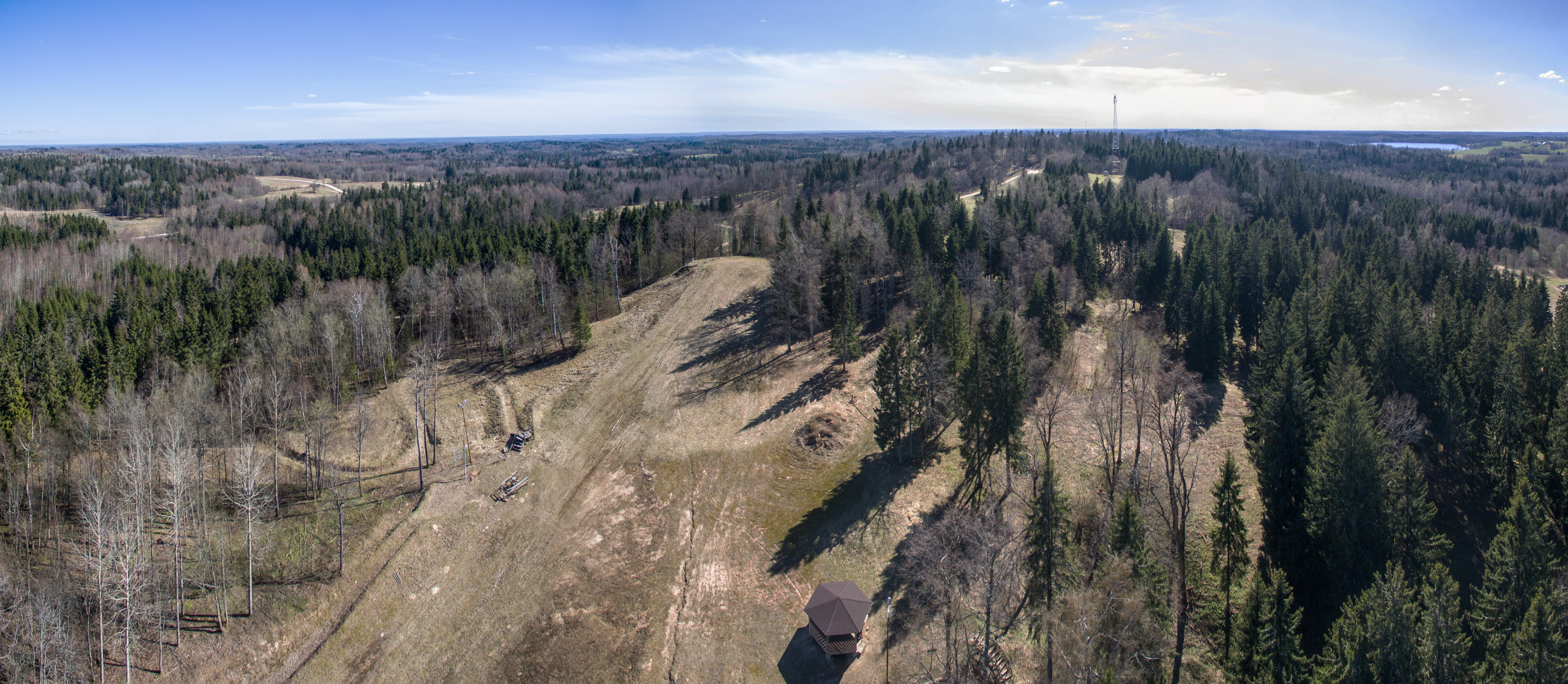 Gaiziņkalns-aeropanorama